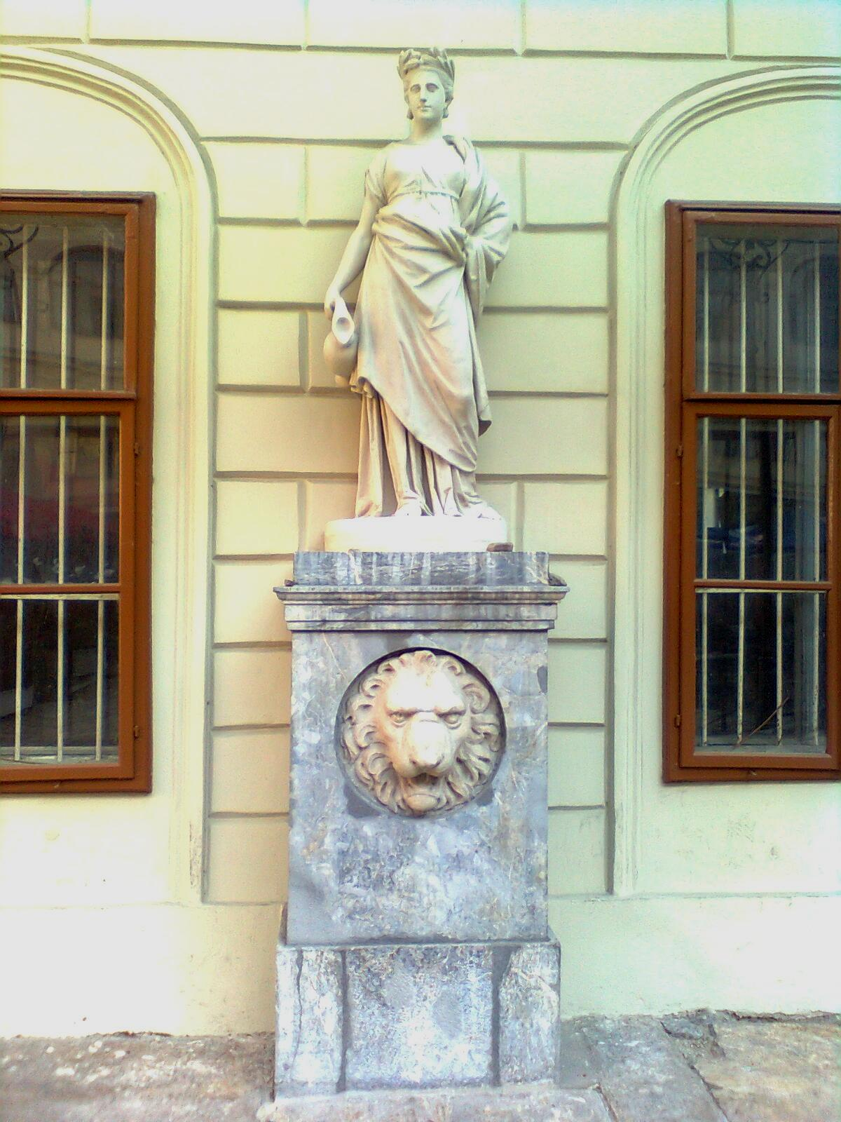 Nymphen-Brunnen im Innenhof der Alten Post am Grazer Jakominiplatz